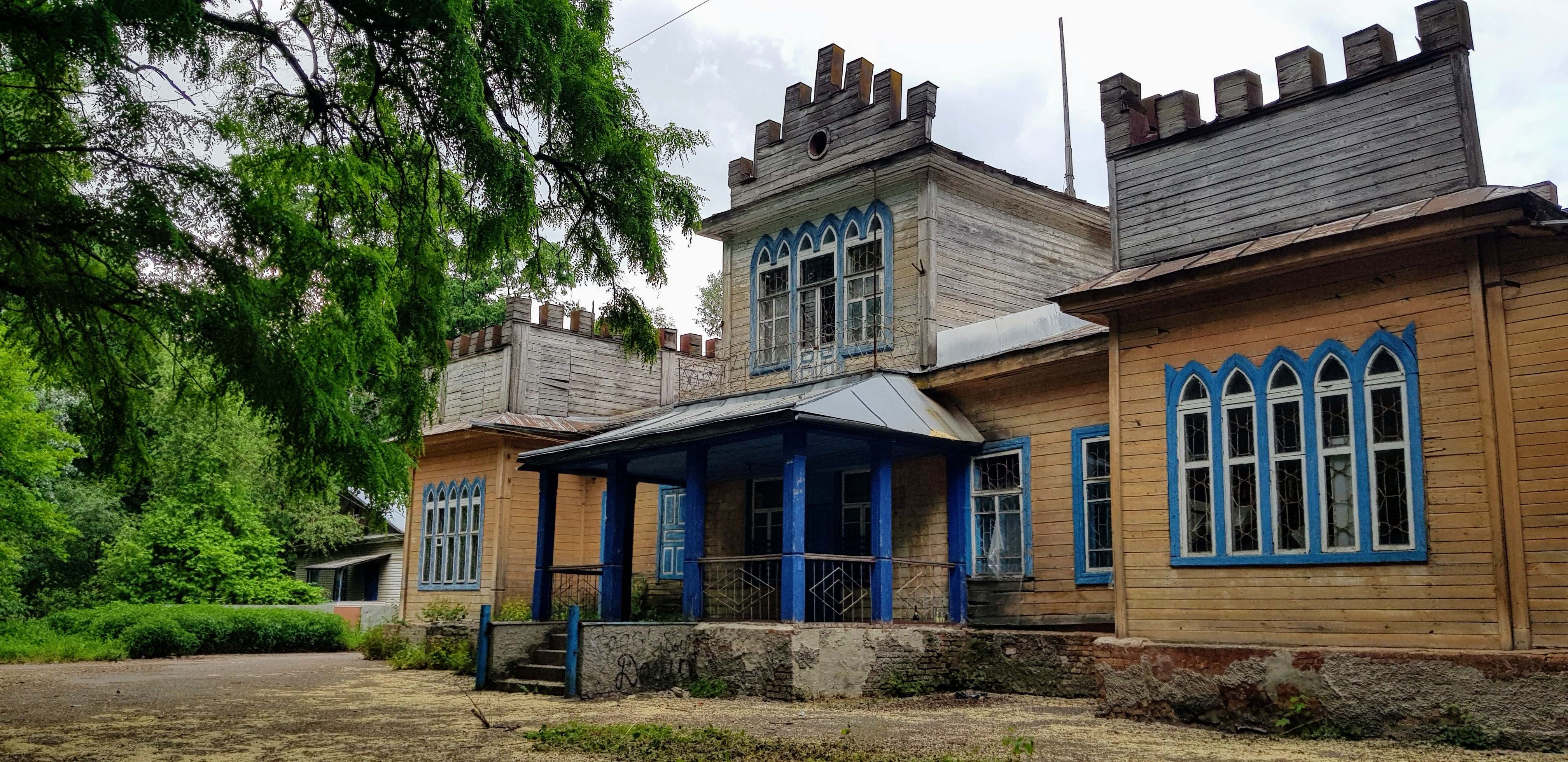 Будинок Пашковських у Чемері